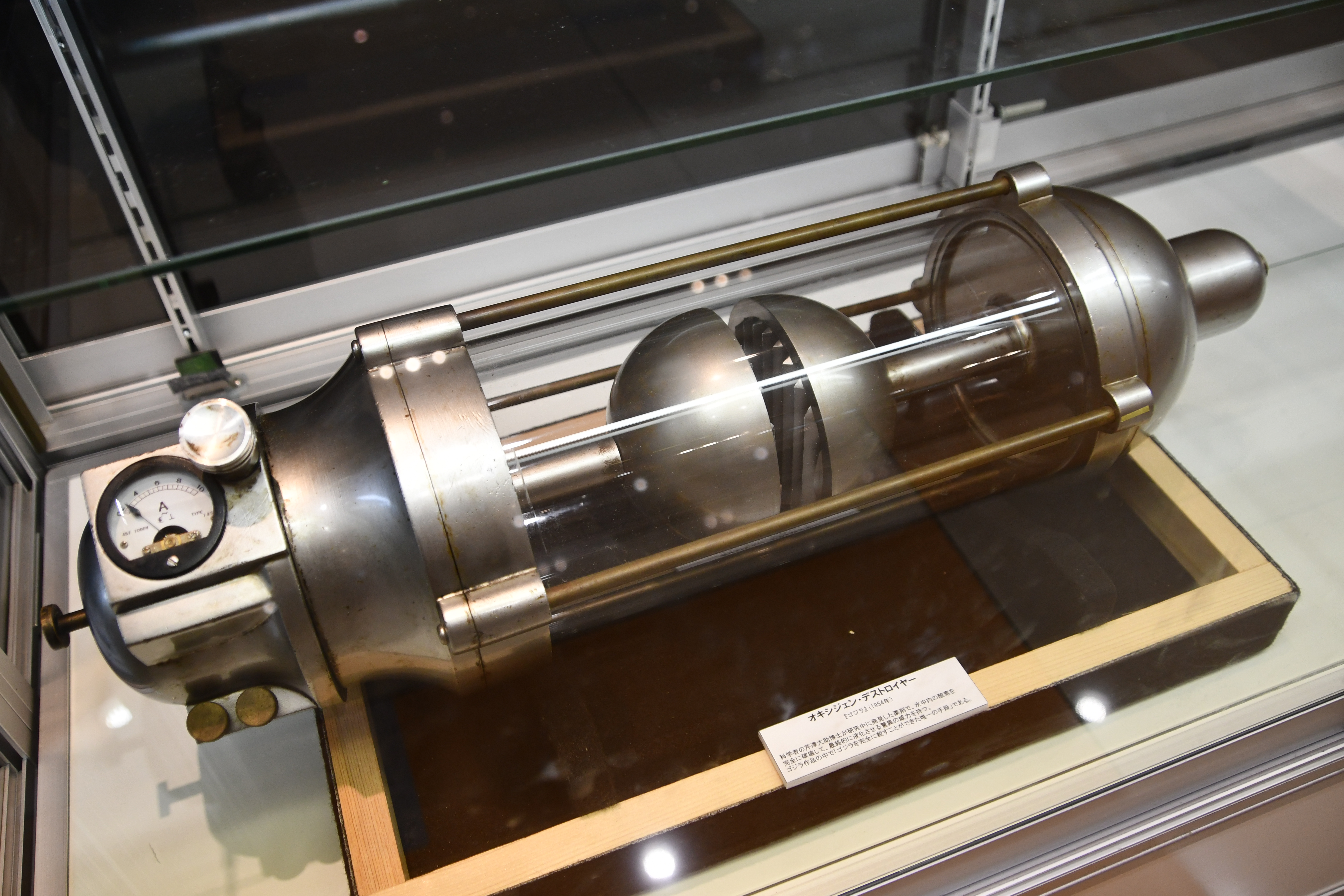 映画「ゴジラ」劇中にて使用された水中酸素破壊剤”オキシジェン・デストロイヤー”の撮影用プロップ。2019年6月29日 アリオ八尾店内にて。